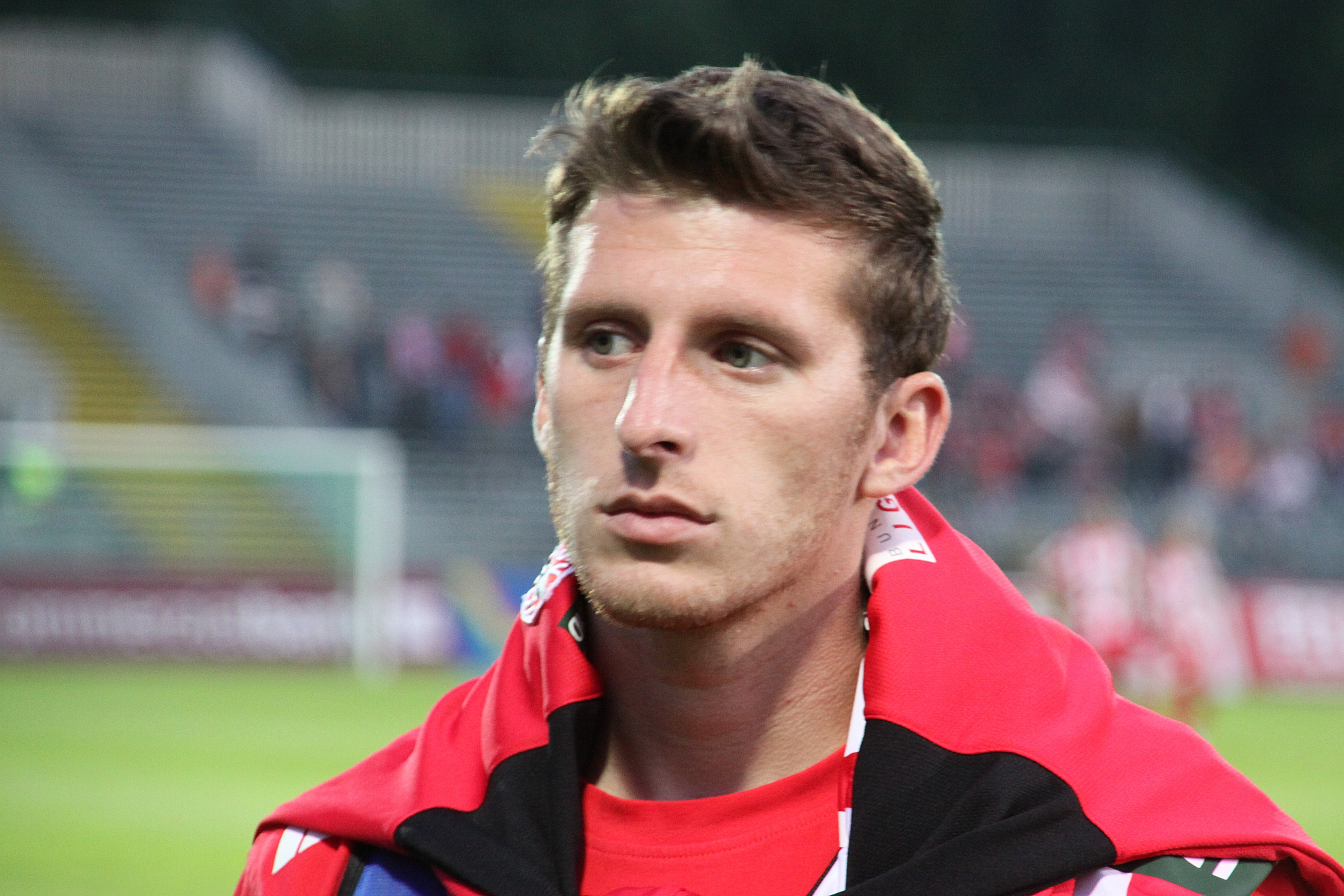 Patrick Osoinik – SV Kapfenberg